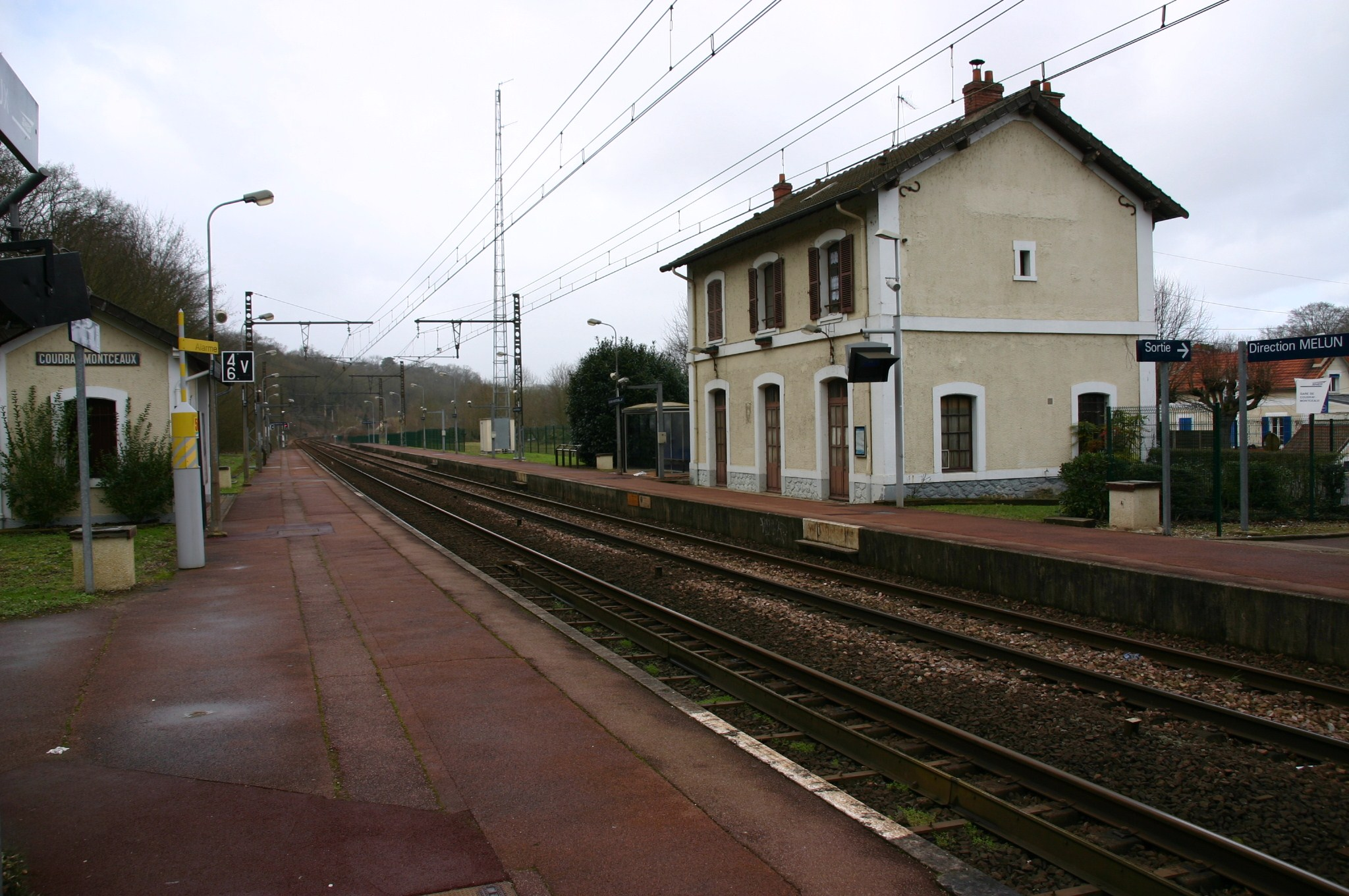 La gare du Coudray-Montceaux, Coudray-Montceaux, département de l'Essonne (France)